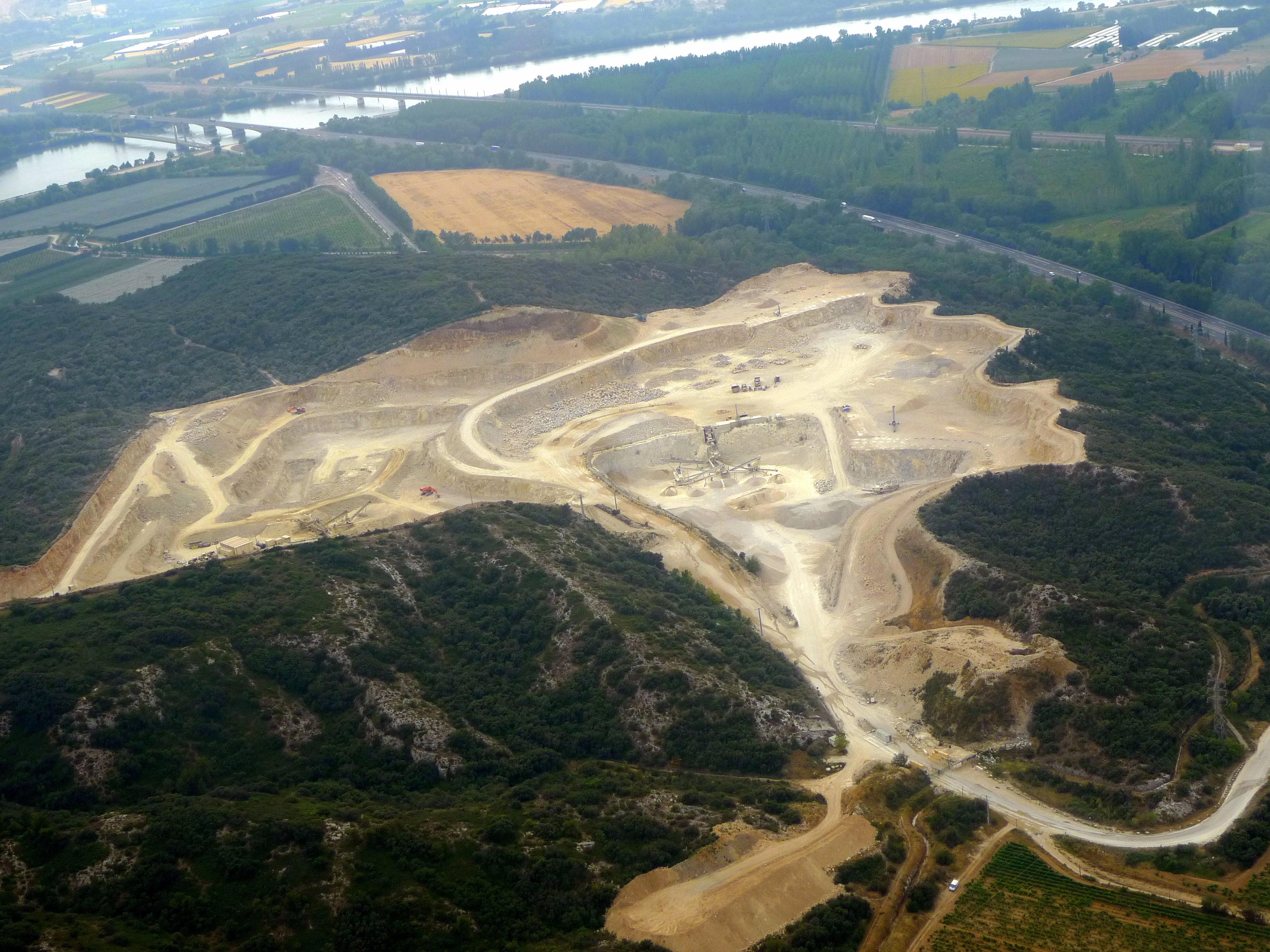 Carrière du Lampourdier jouxtant le vignoble de Châteauneuf-du-Pape